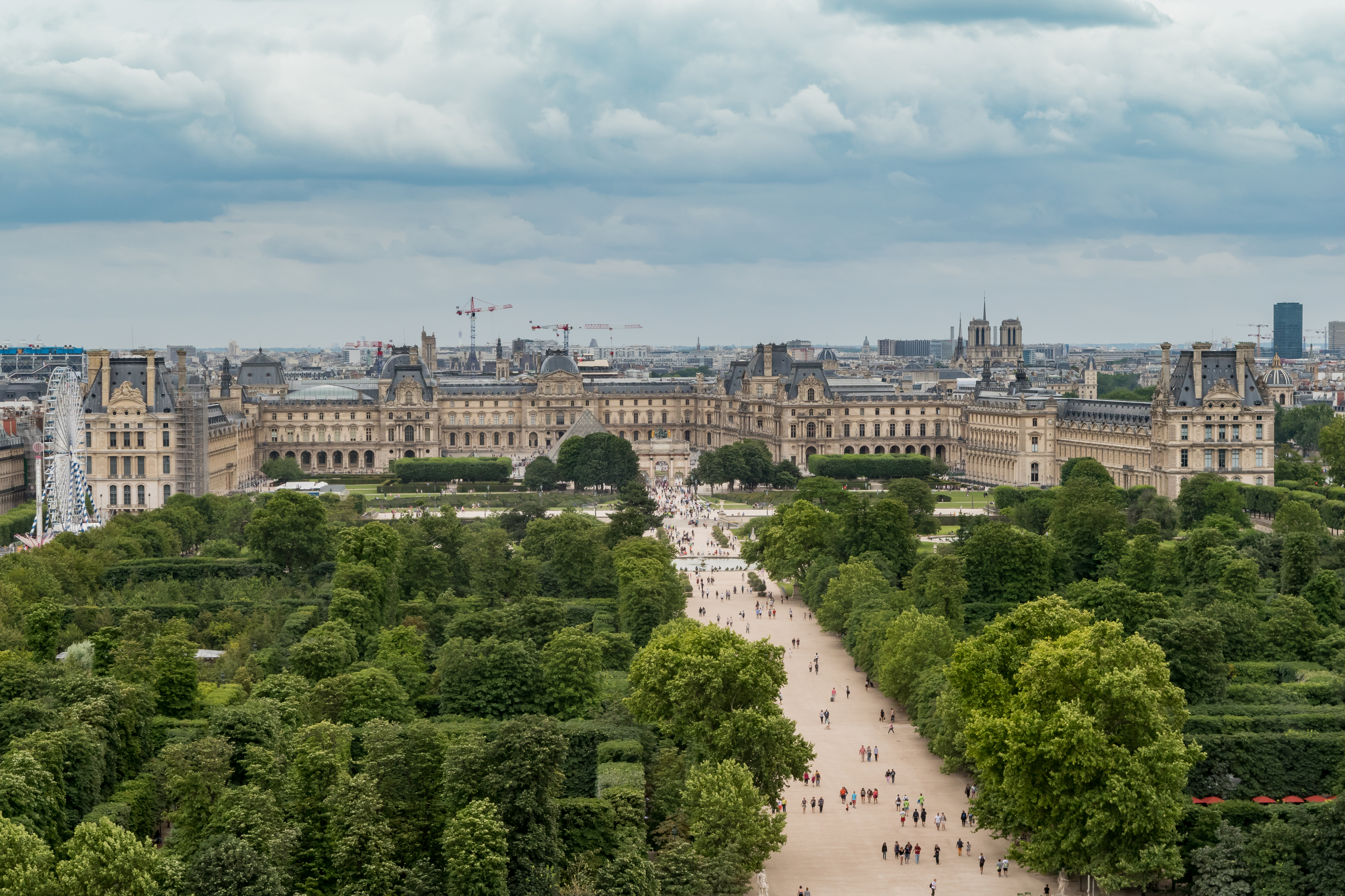 Louvre Museum